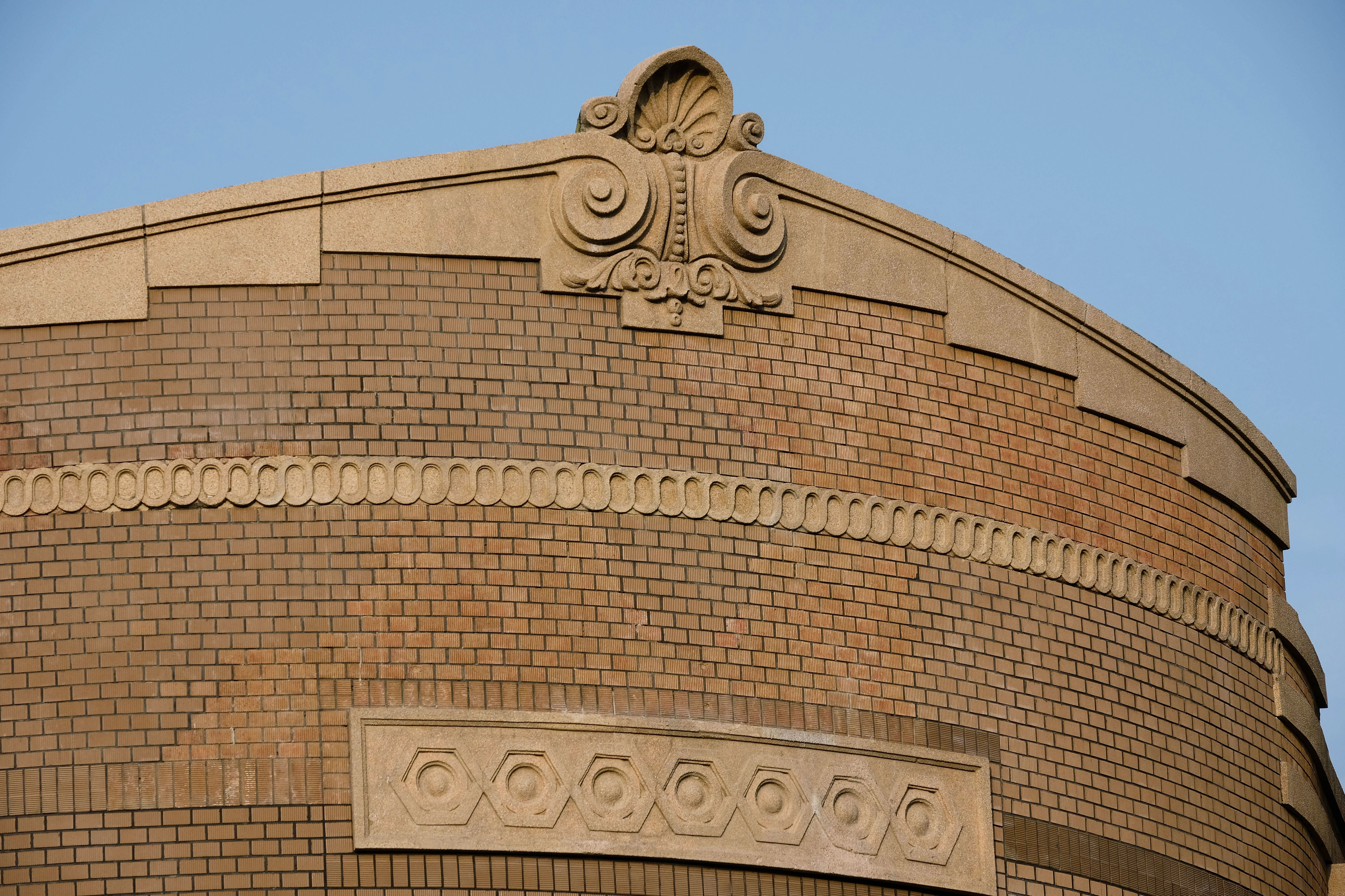 原臺南警察署的山牆與龜甲裝飾